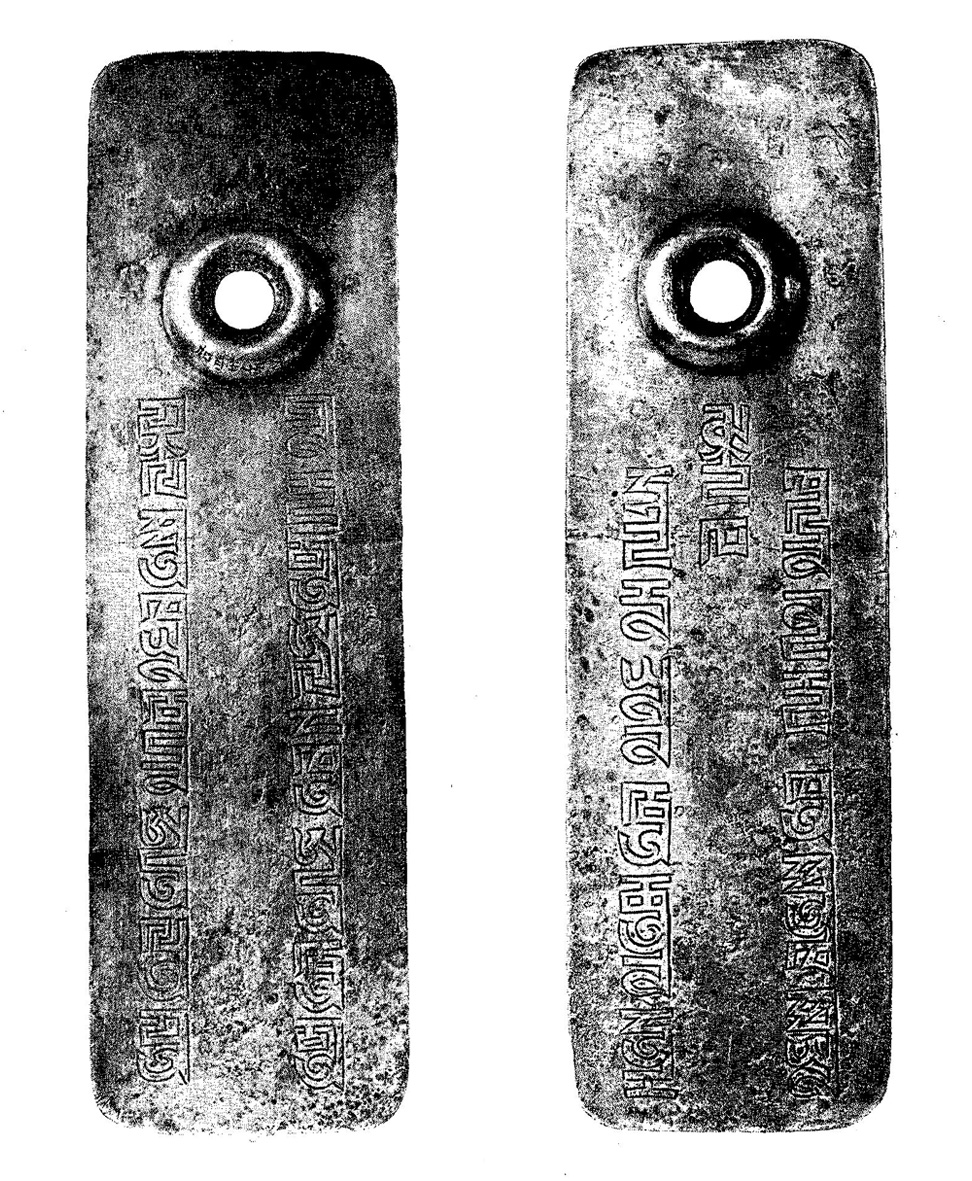 Нюкская пайцза. Найдена близ с. Нюкское Ильинской волости Верхнеудинского округа Забайкальской области Российской империи в 1853 году («Нюкский клад»). Серебро; золочёная надпись по-монгольски квадратным письмом: «Силою вечного тенгри. Имя императора да будет свято. Тот, кто не будет относиться с благоговением, совершит проступок и умрёт» (Перевод Н. Н. Поппе. Квадратная письменность. — М.—Л.: Издательство АН СССР, 1941).